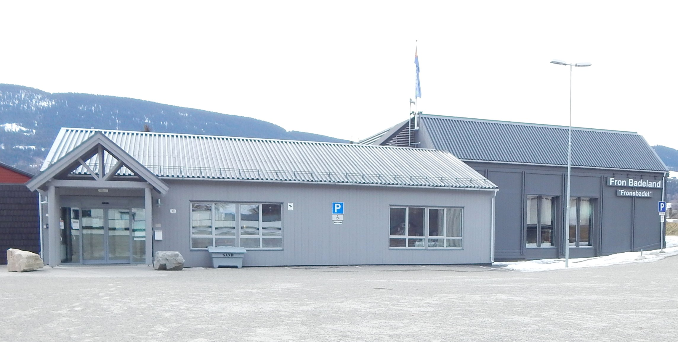 Fron badeland på Harpefoss